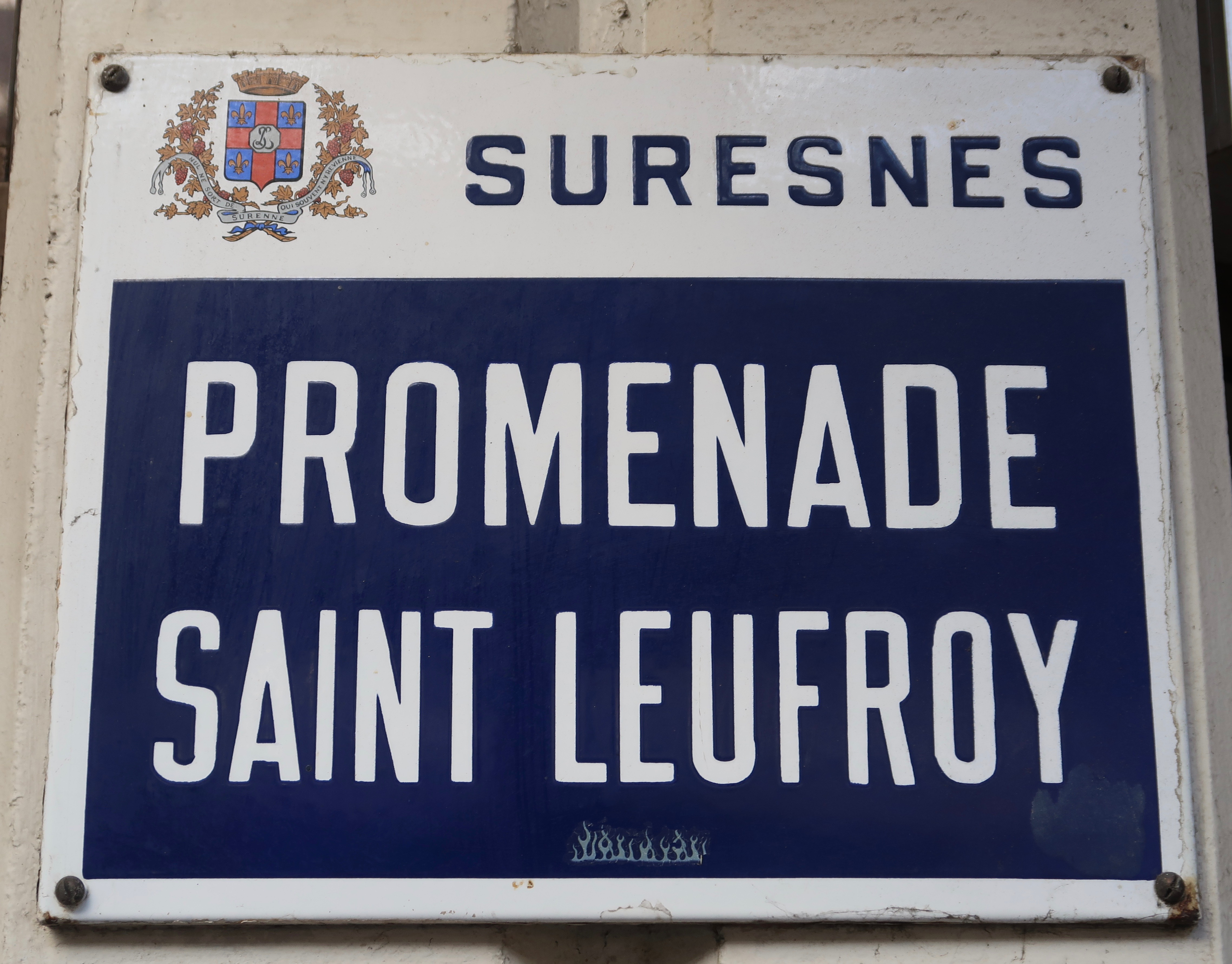 Plaque de la promenade Saint-Leufroy à Suresnes (Hauts-de-Seine).